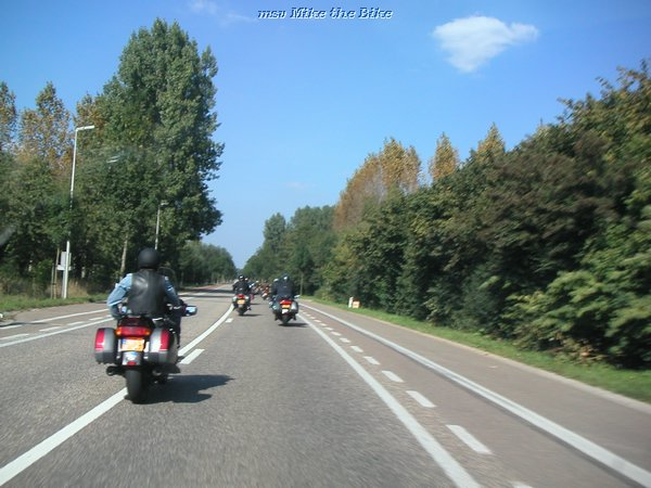 Foto: MSV Mike the Bike